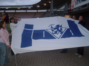 Foto van de vlag van de Jongeren Organisatie Vrijheid en Democratie